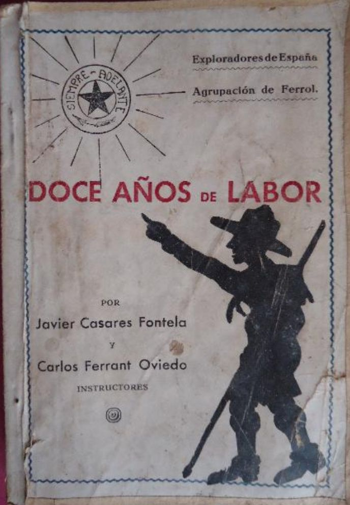 Portada del libro "Doce años de labor" de J. Casares Fontela y Carlos Ferrant Oviedo. Exploradores de España. Agrupación de Ferrol.